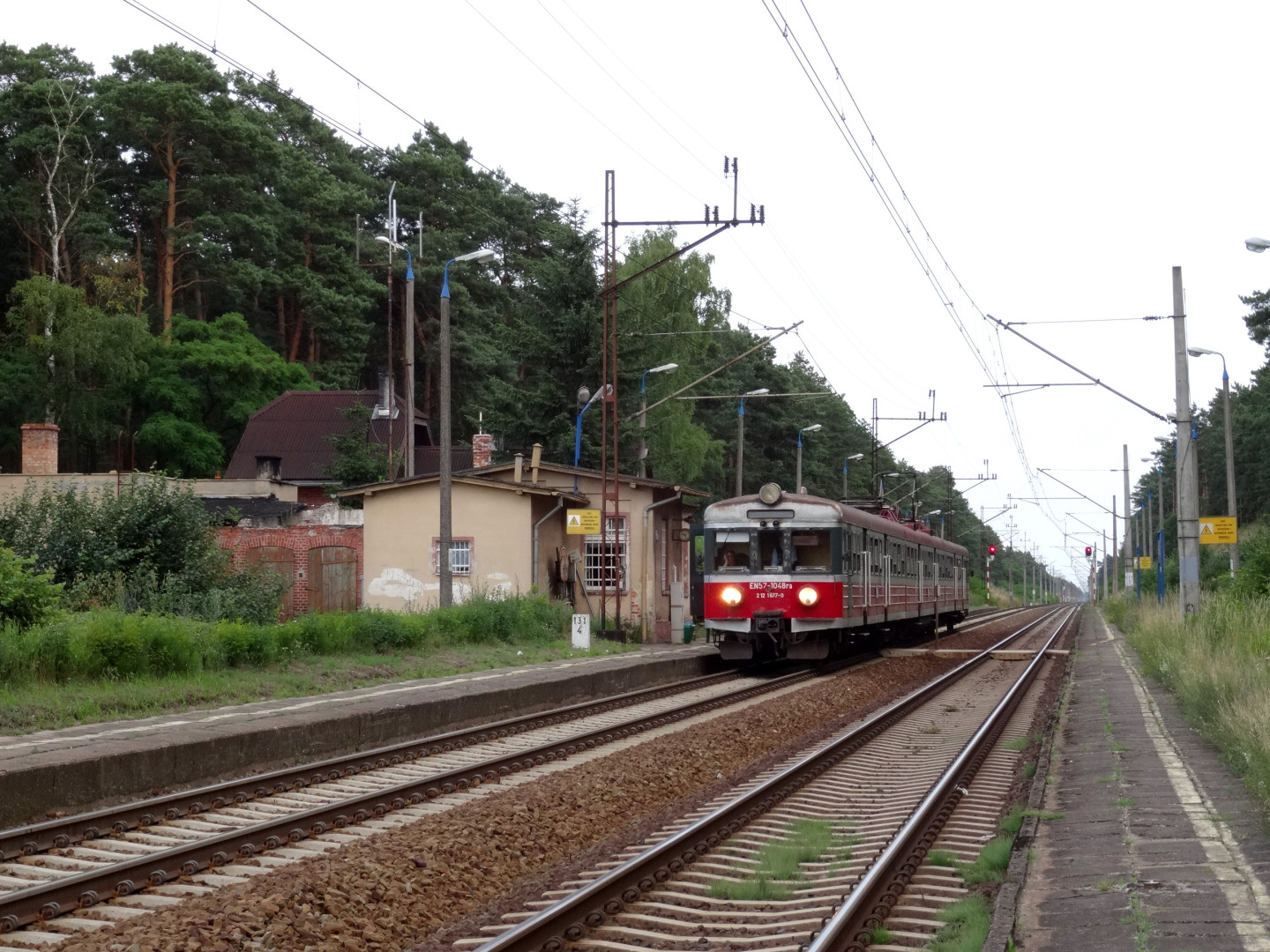 Stacja kolejowa w Przyłubiu, gmina Solec Kujawski, powiat bydgoski